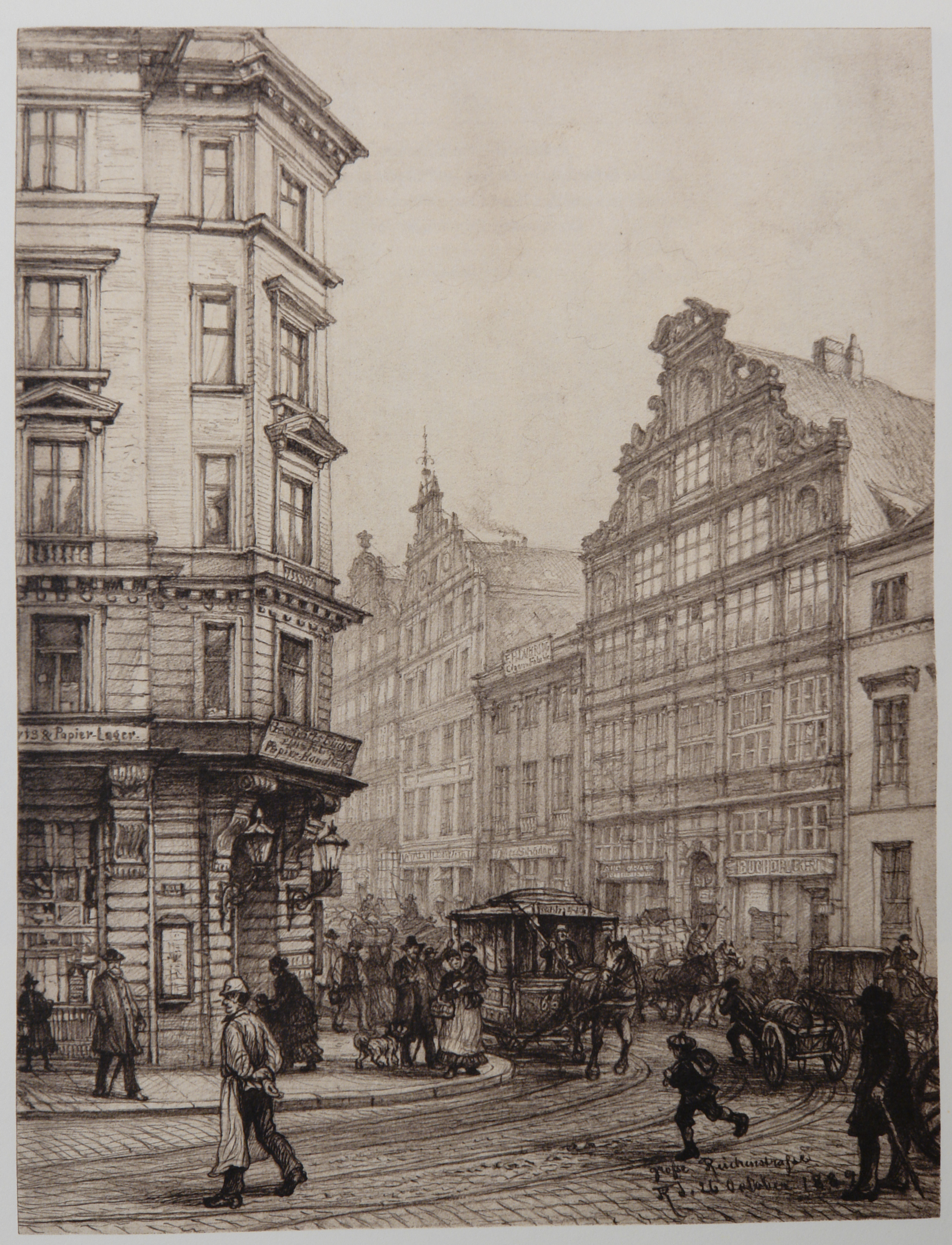 HAMBURG. Augenblicke einer Stadt 1882-1894. In 50 Zeichnungen von Johann Theobald Riefesell nach Originalen im Museum für Hamburgische Geschichte. große-Reichsstraße-49 26-10-1889